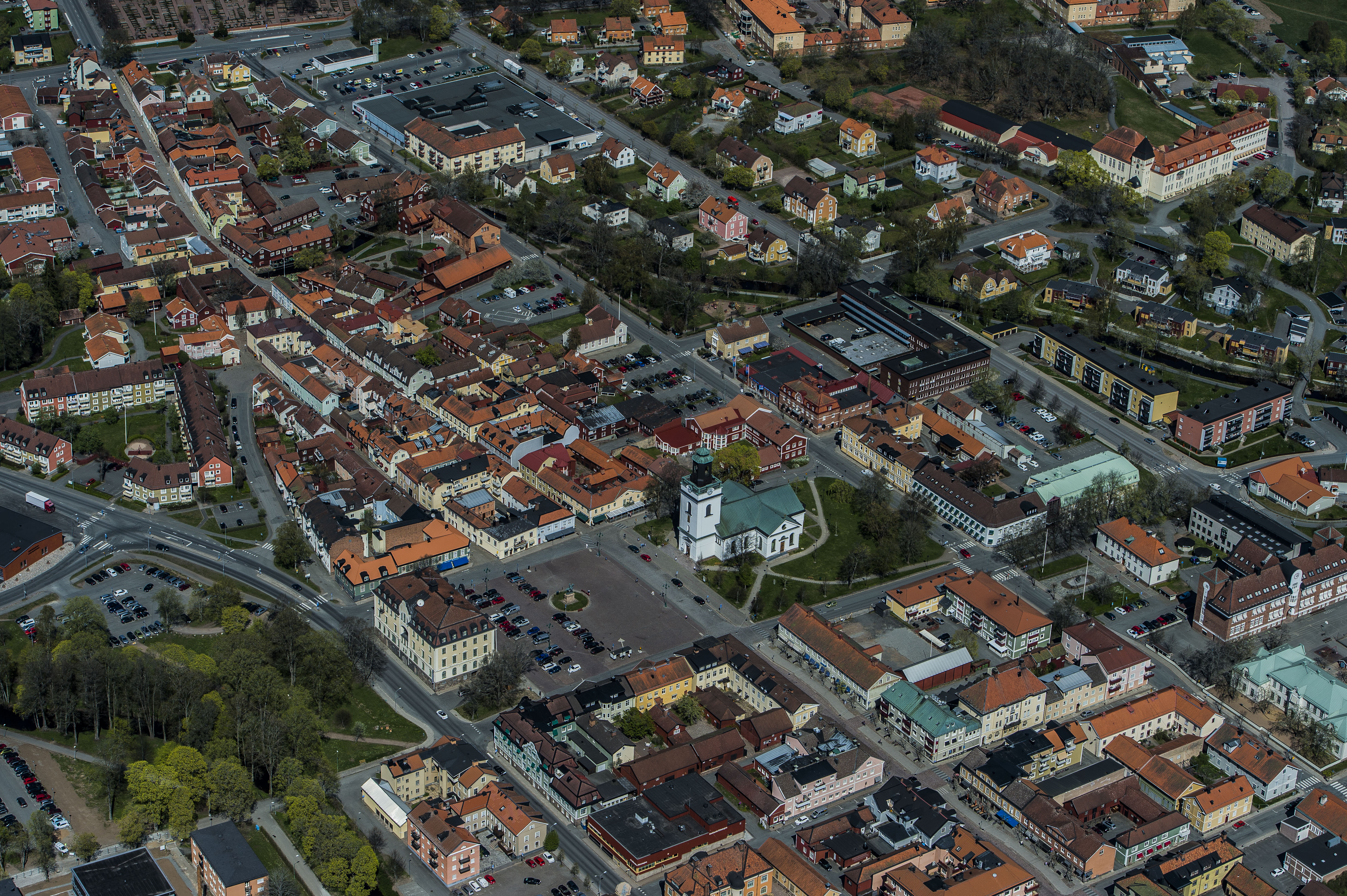 Eksjö kyrka från ovan